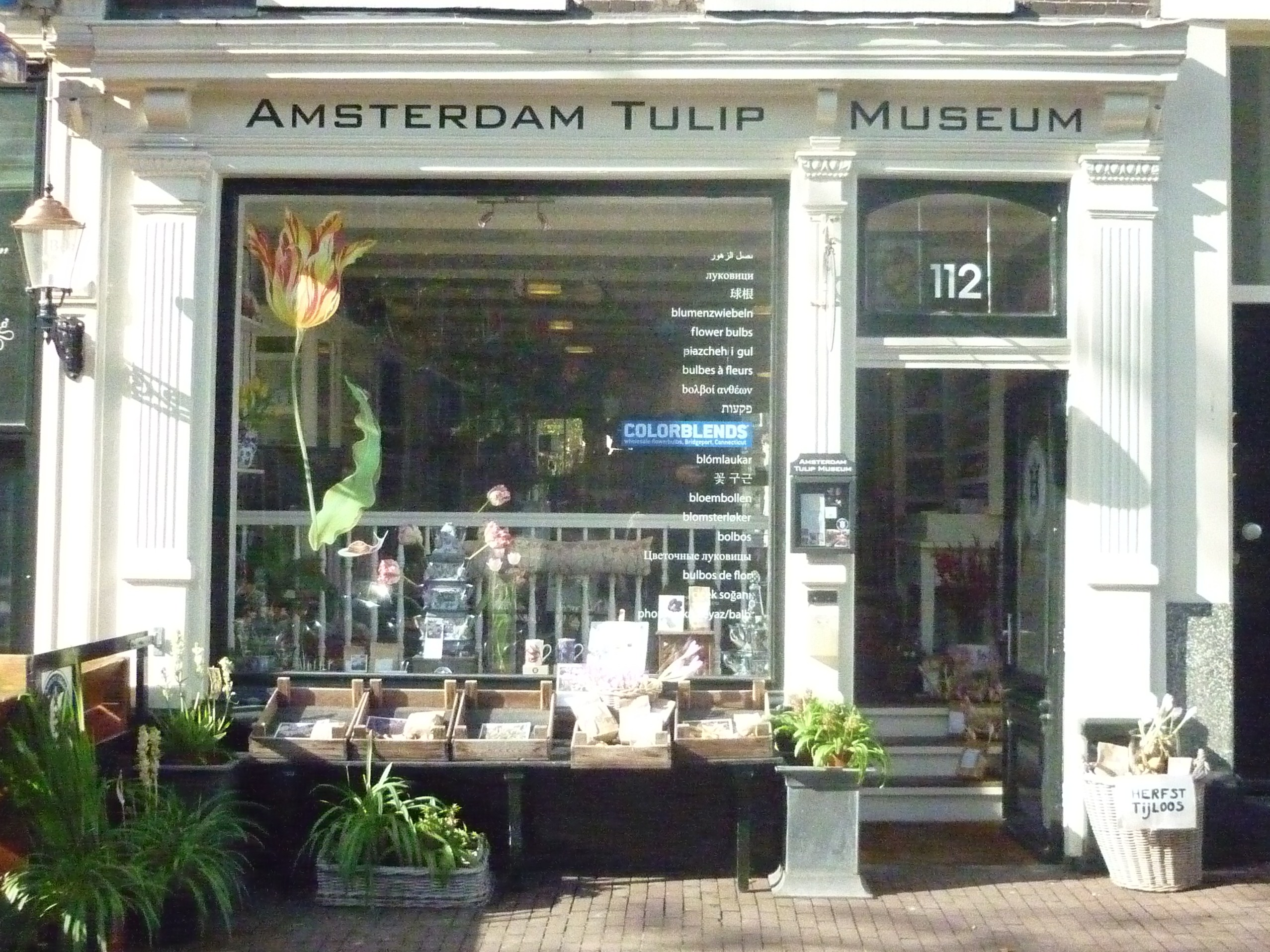 Tulpenmuseum Amsterdam